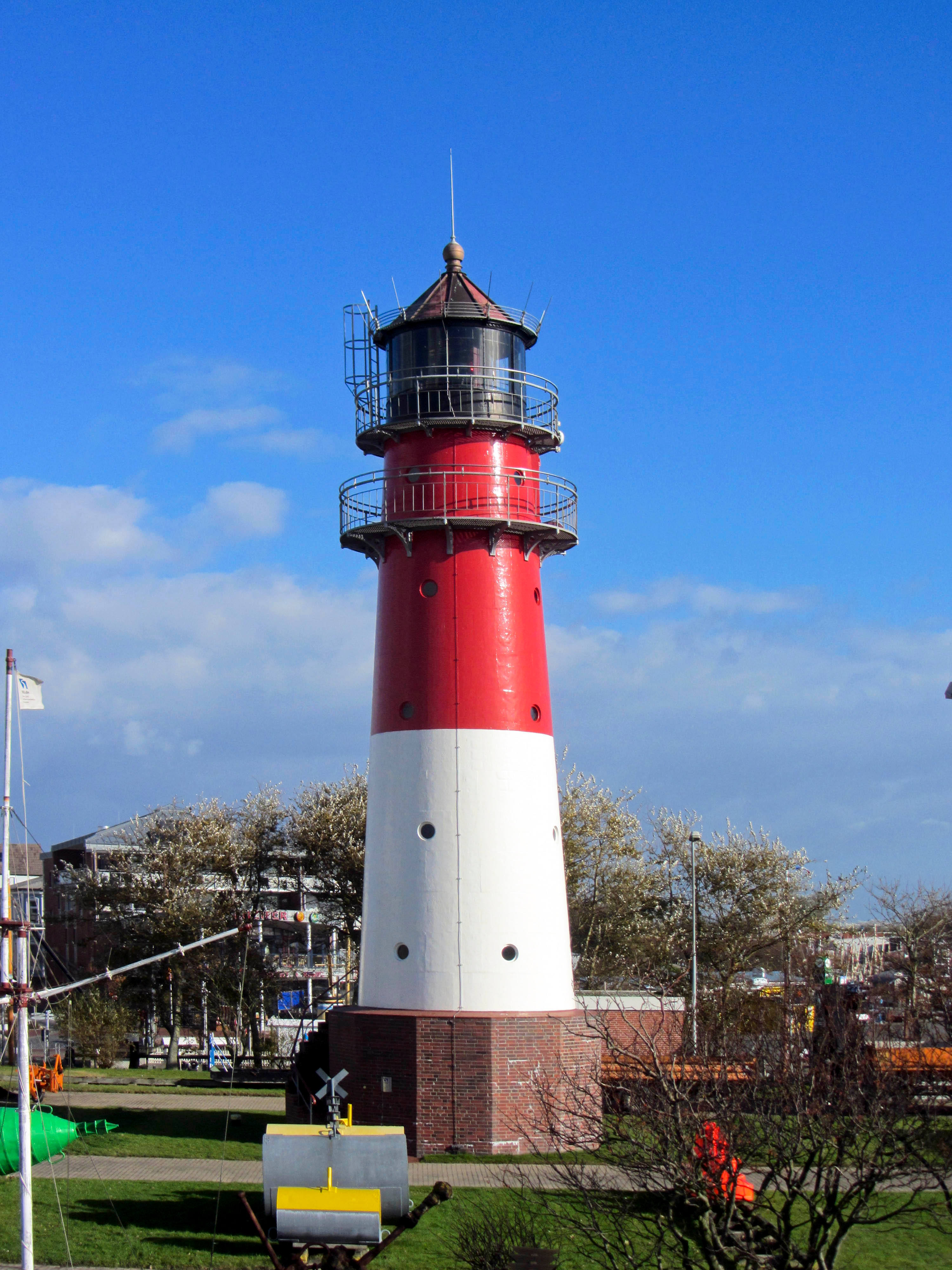 Leuchtturm Büsum